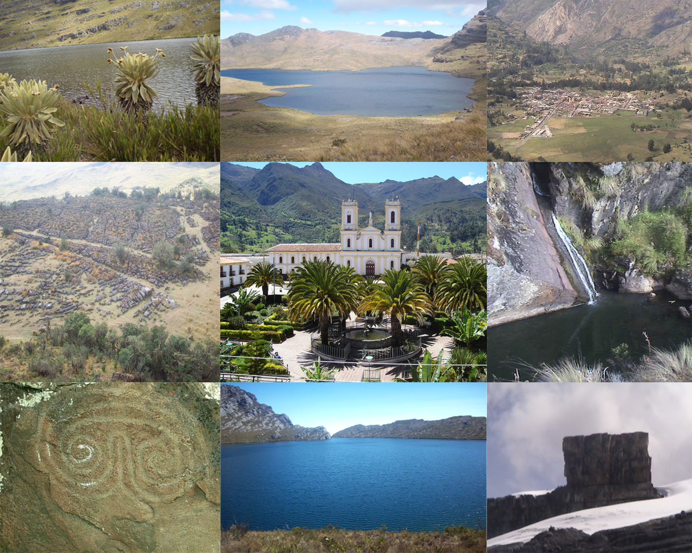 Estos son los simbolos del municipio